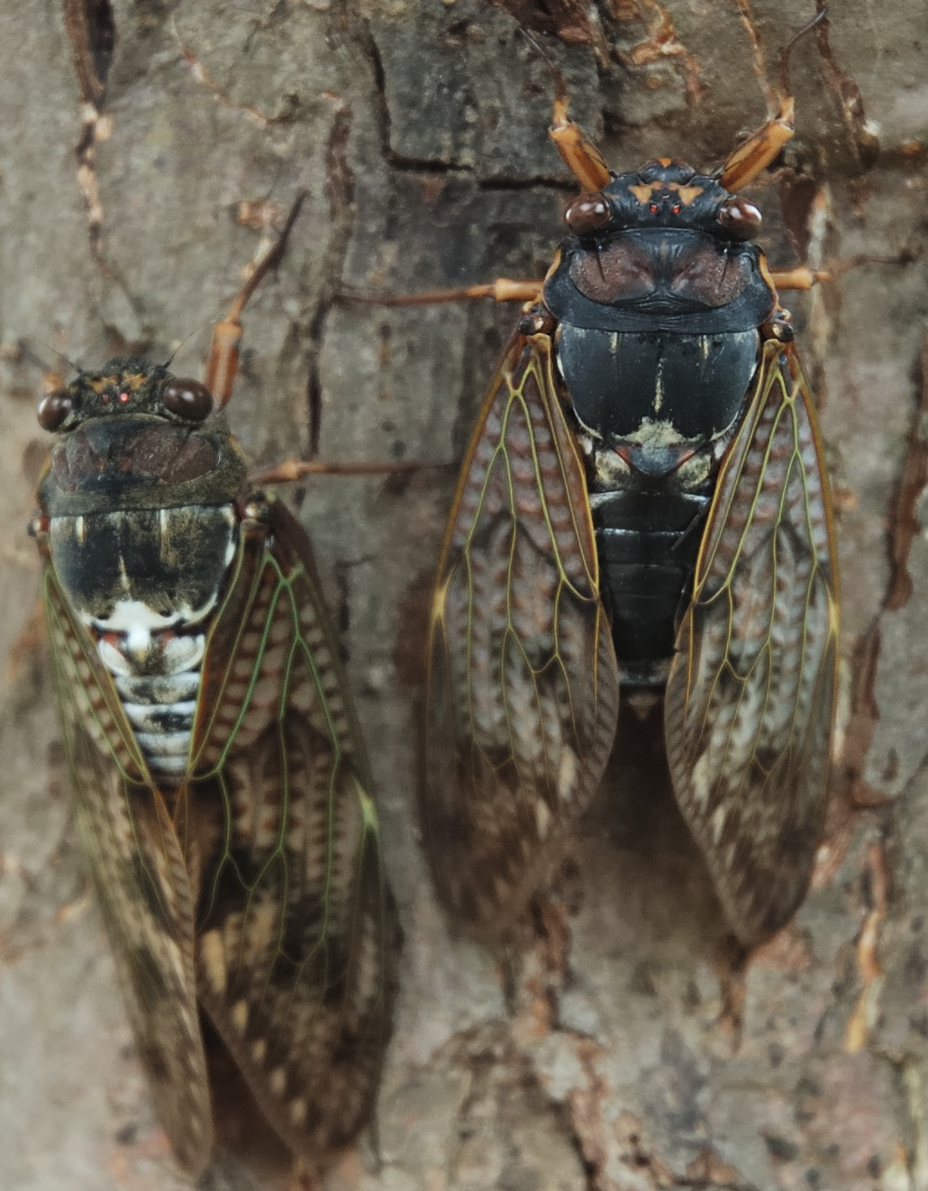 Graptopsaltria nigrofuscata (アブラゼミ)